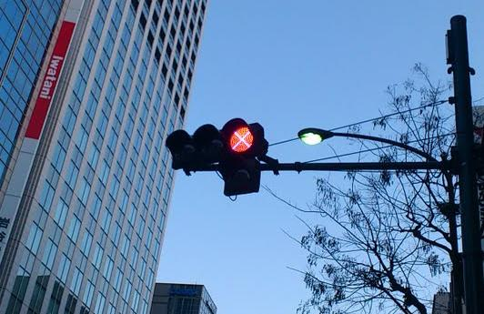 色覚異常の人に配慮されたLED信号機。赤信号に×印を表示し、黄信号と見分けやすくした。2012年2月、芝郵便局前交差点に試験設置。